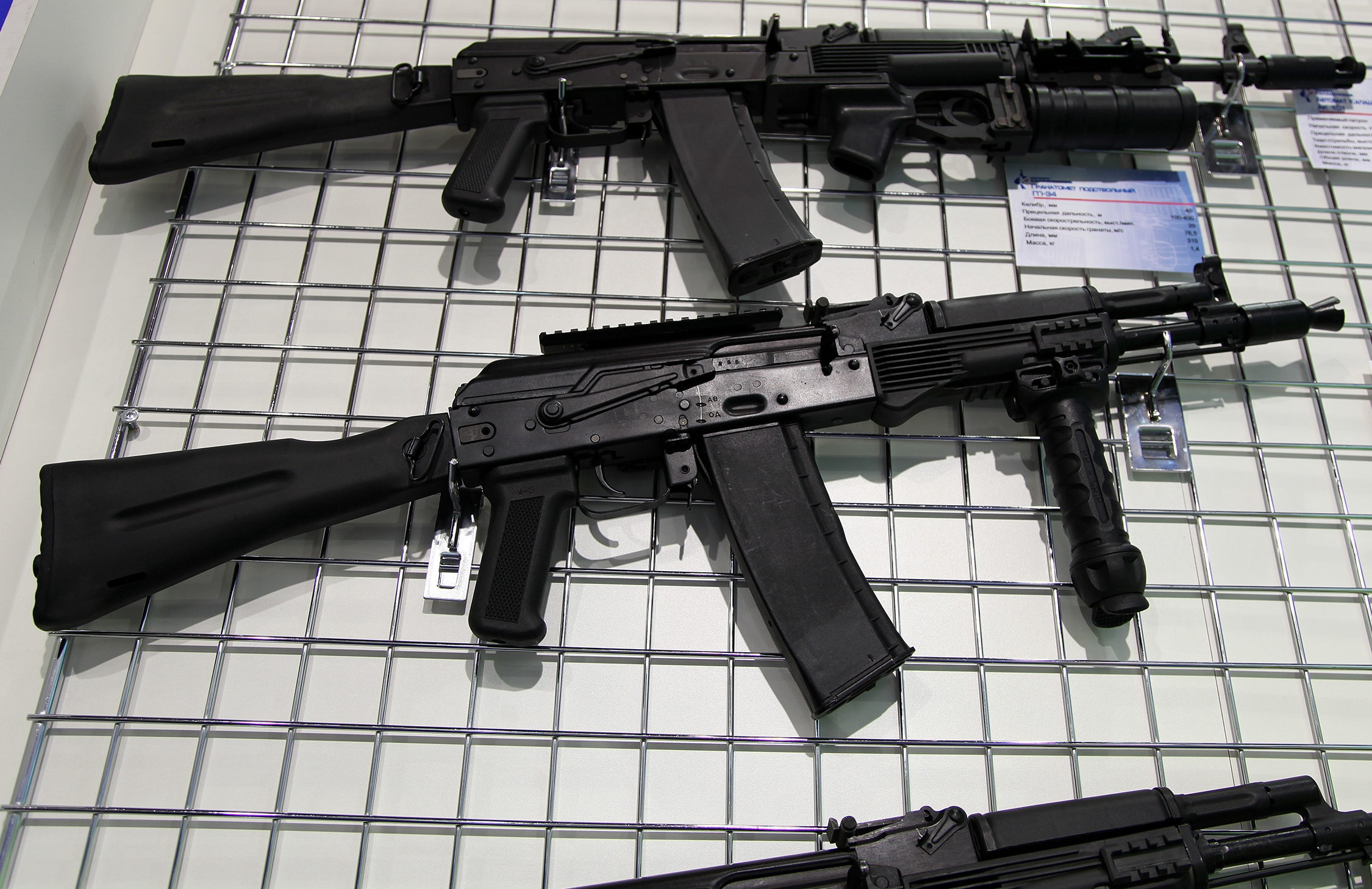 AK-102